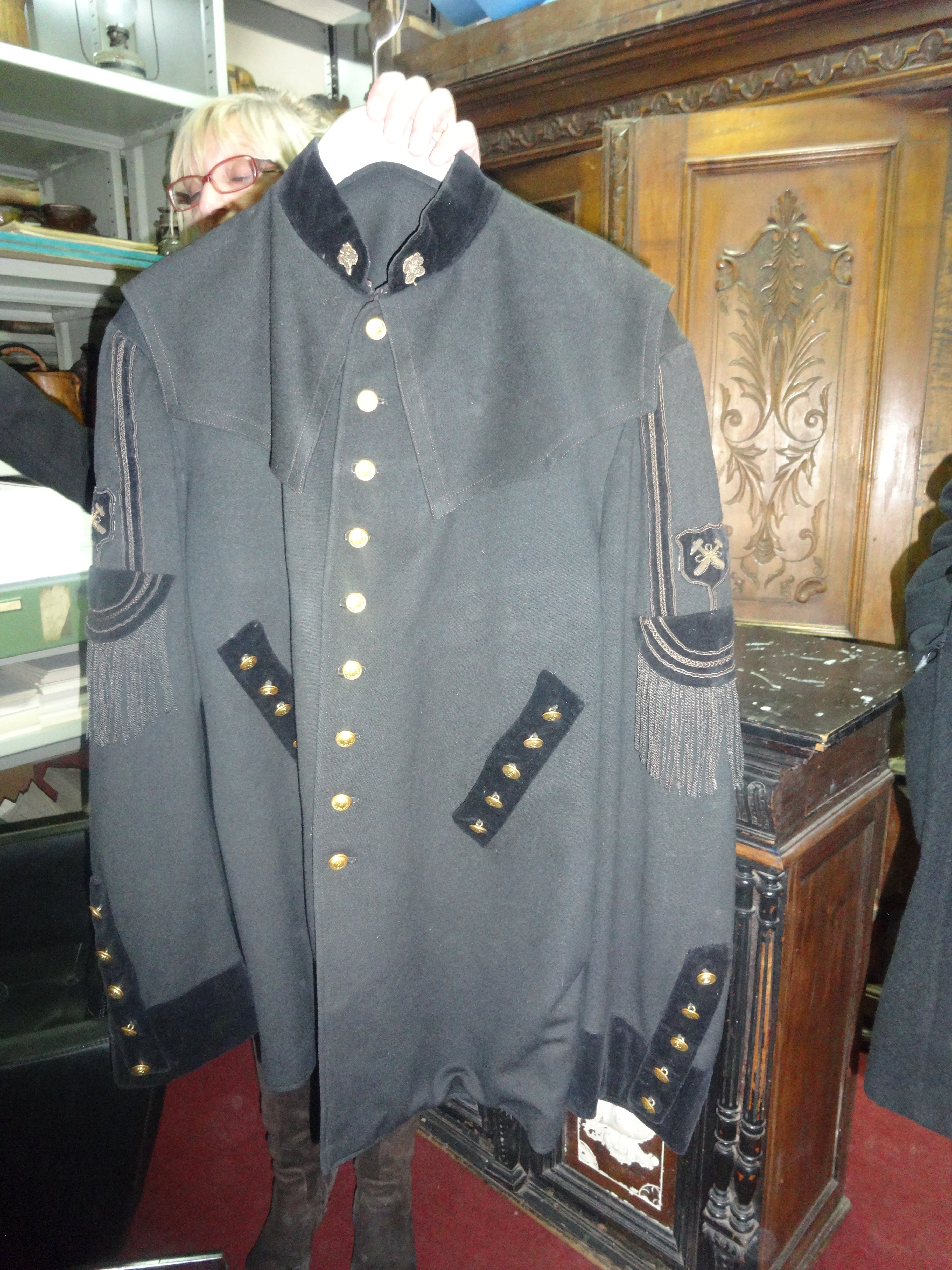 Rudarsko odelo, Muzej rudarstva i metalurgije Bor.